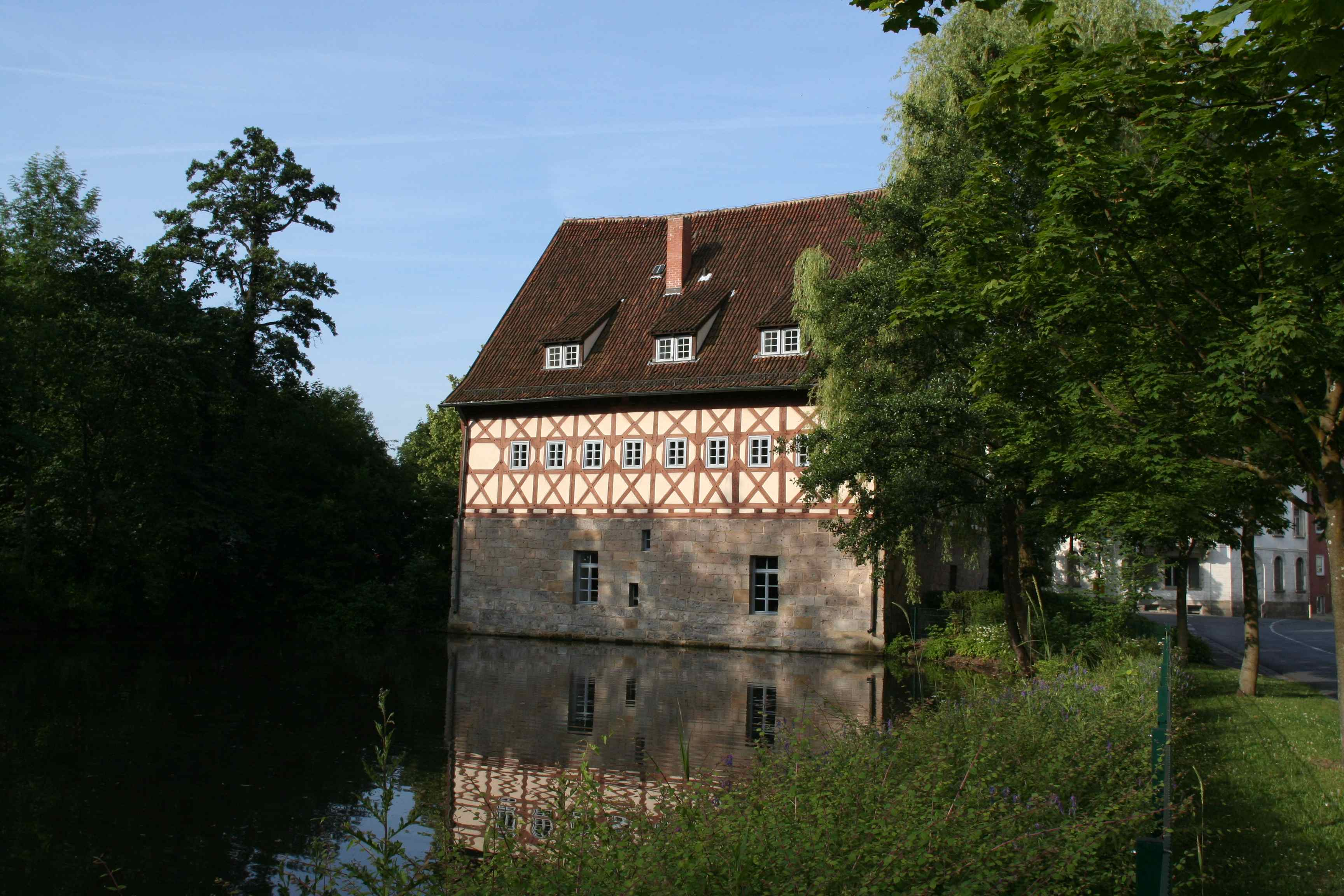 Burg Rosenau in Coburg Allee 3 am Rittersteich